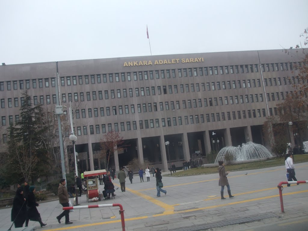 Ankara Adalet Sarayı, Sıhhiye 2011.